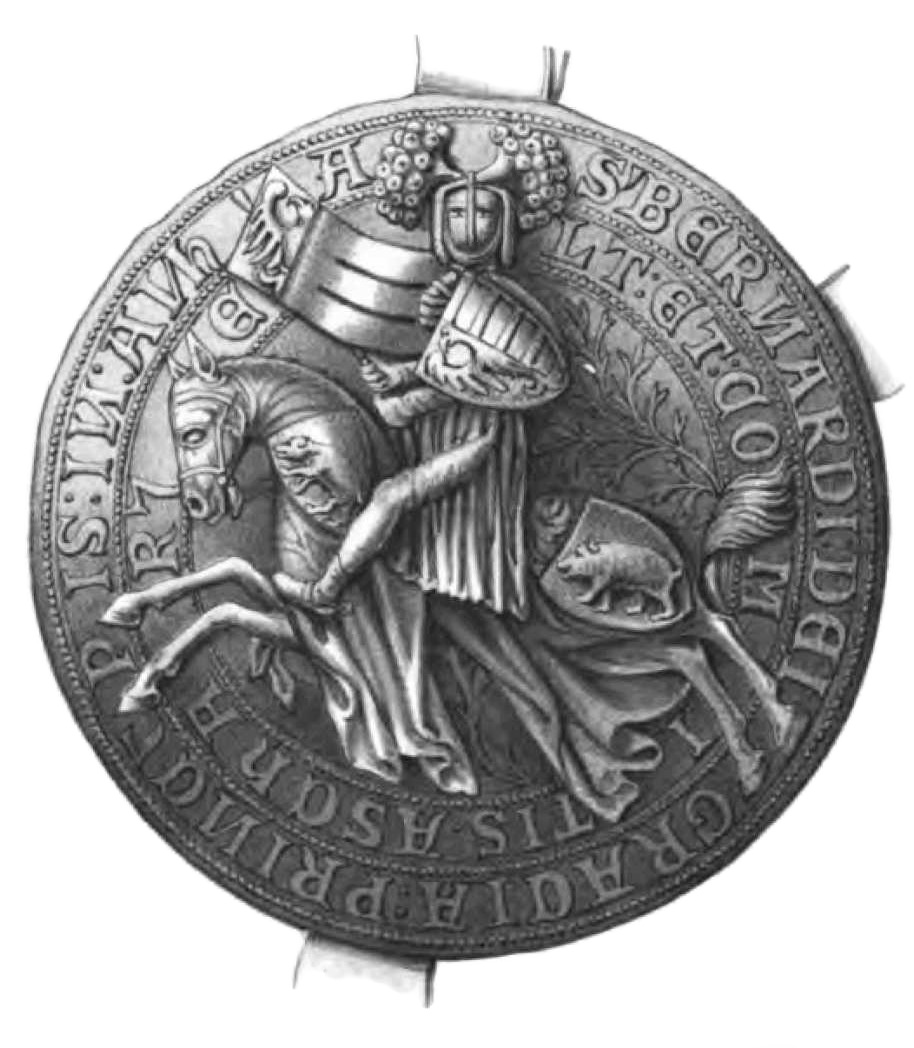 Großes Reitersiegel des Fürsten Bernhard III. von Anhalt-Bernburg (Original veröffentlicht im Codex diplomaticus anhaltinus, Band 3)